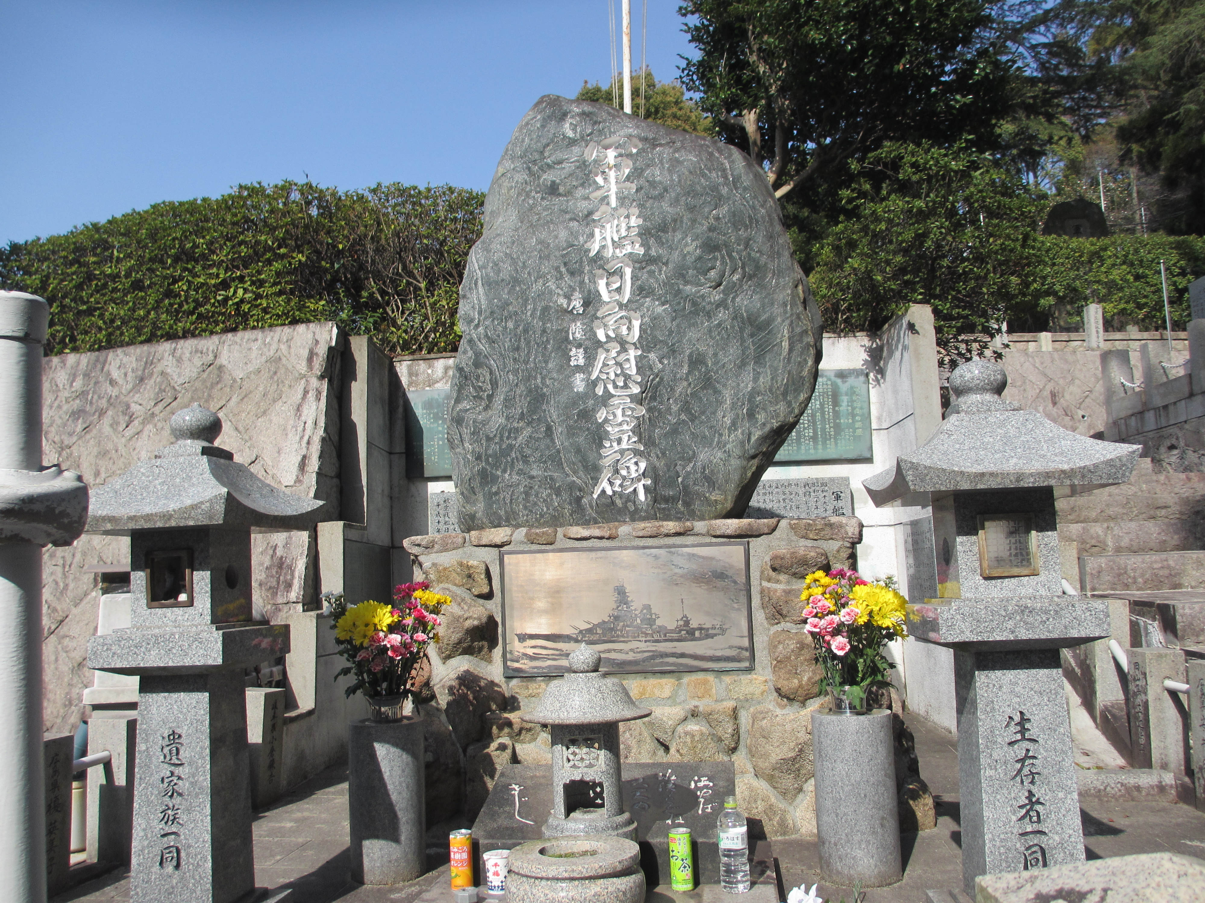 呉市上長迫町旧海軍墓地、坂道キツイ